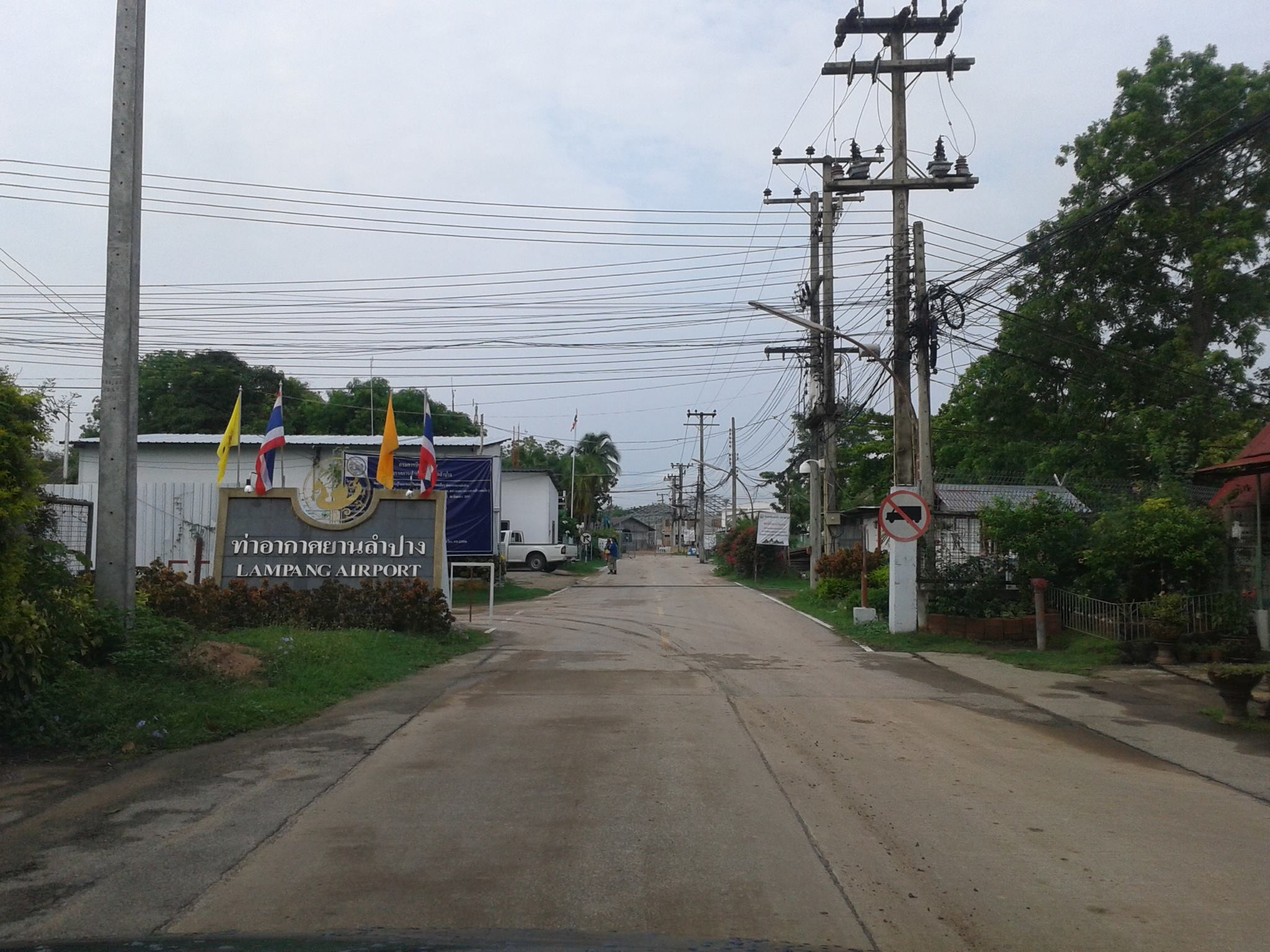 ท่าอากาศยานลำปาง